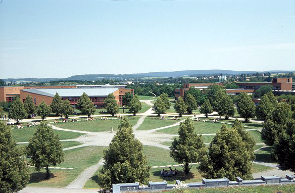 Bayreuth - Universitätscampus. Links: Bibliothek, Rechts: Rechts- und Wirtschaftswissenschaften (RW).